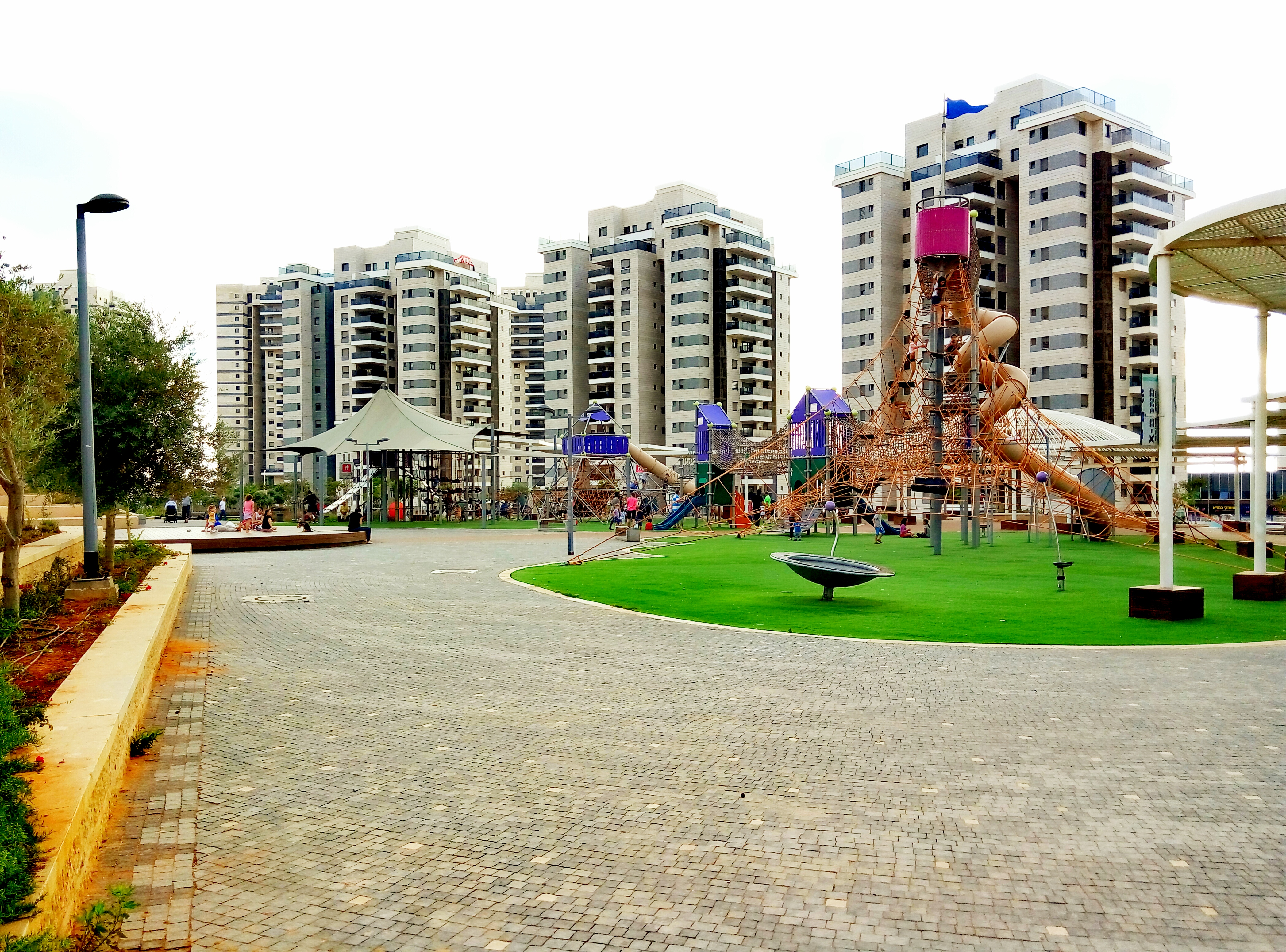 מתקן הספינה בפארק הפרפר רמת הנשיא